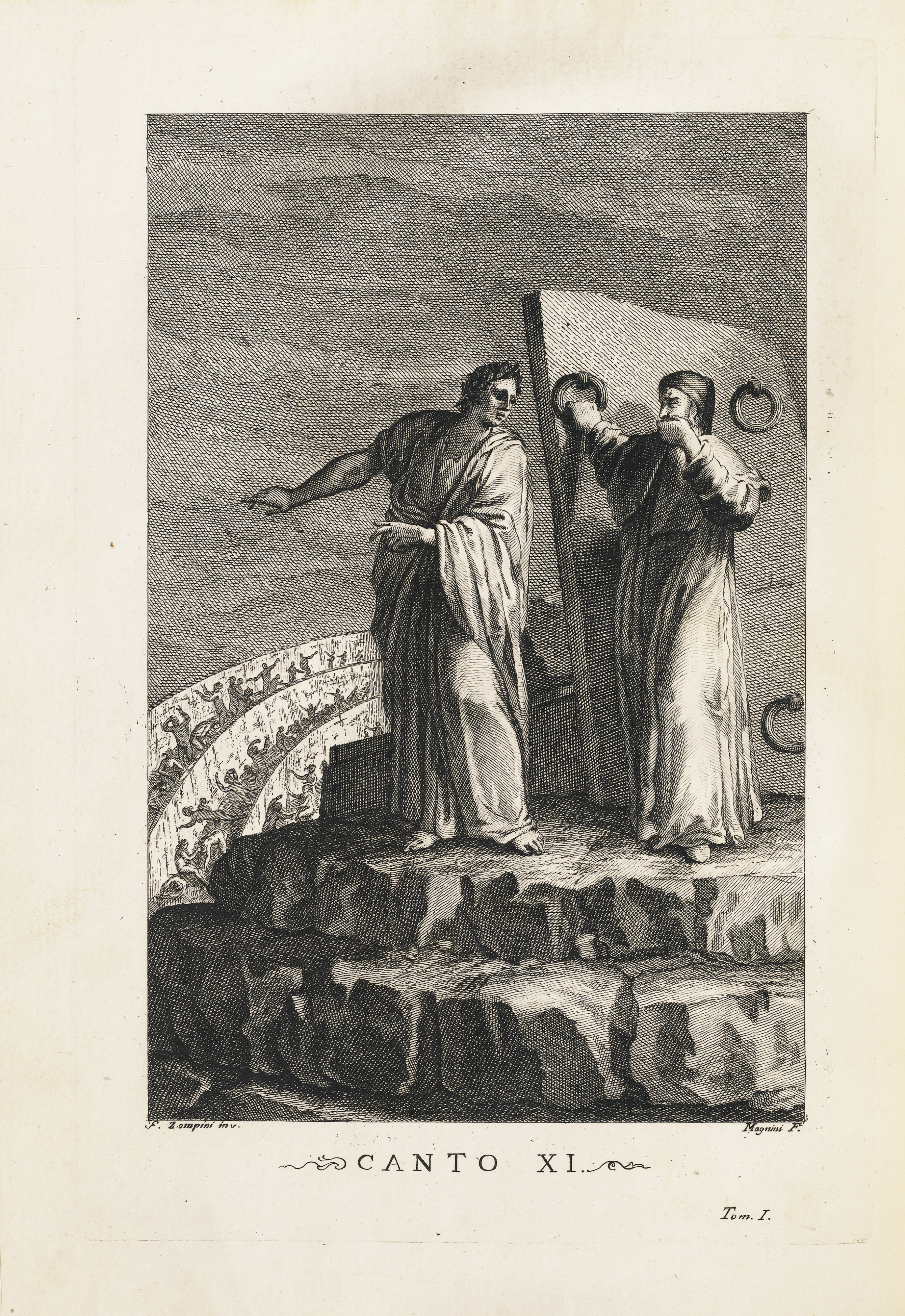 La Divina Commedia. Venise, Antonio Zatta, 1757-1758. 5 volumes in-4 (258 x 190 mm). illustration : 111 illustrations, ainsi qu'une planche pliée, frontispices et gravures hors texte, par Francesco Fontebasso, Zompini, Ticiani, Schiavonio..., gravés par Giampicoli, Magnini, Rizzi, Magnini... reliure pastichant le XVIIIe siècle. Maroquin rouge, triple filet et fleurons d'angles, dos orné de filets et fleurons, tranches dorées.